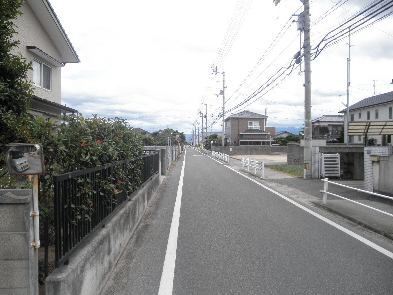 愛媛県伊予郡松前町高柳